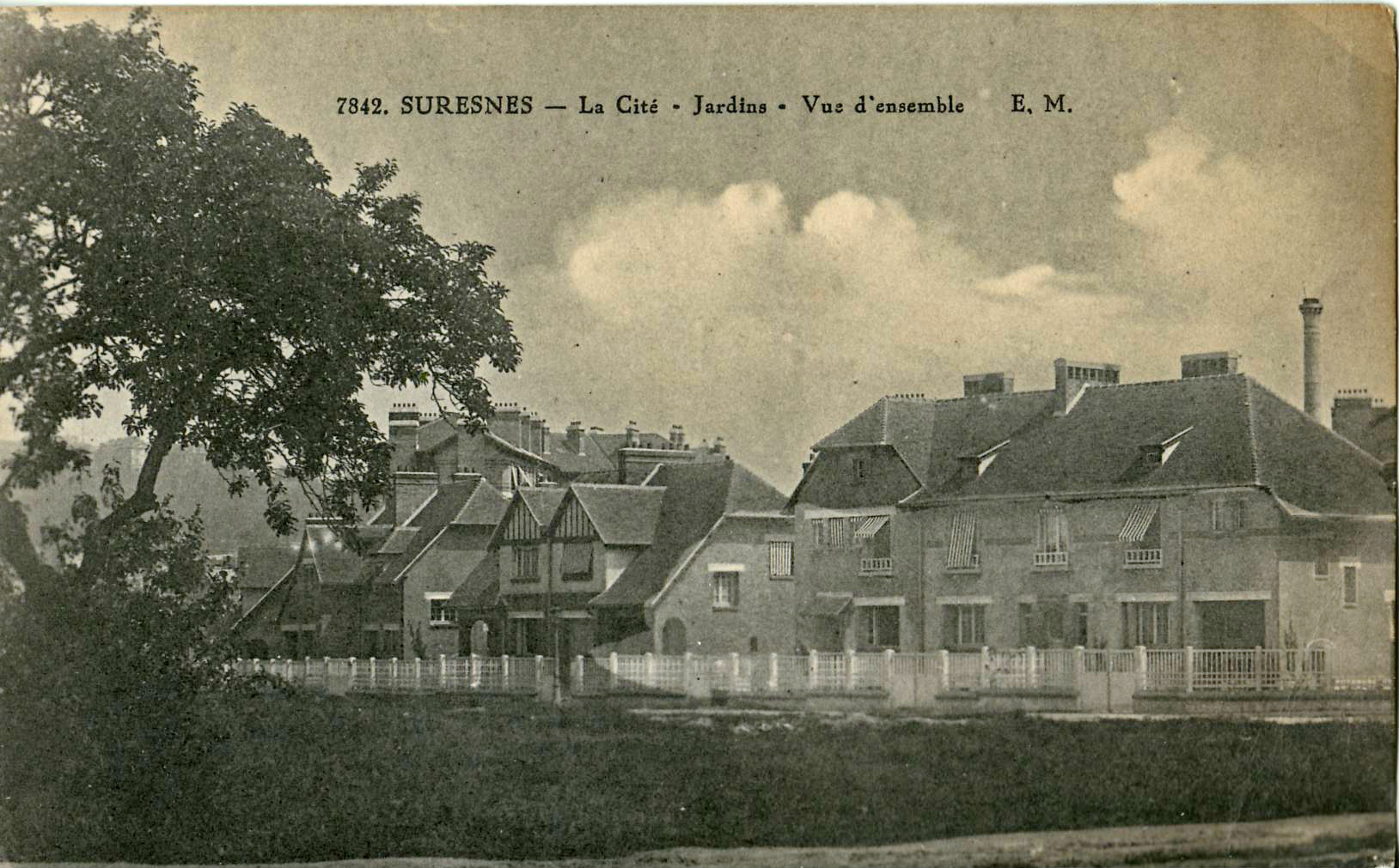 Carte postale ancienne éditée par EM n°7842 :SURESNES - La Cité-Jardin